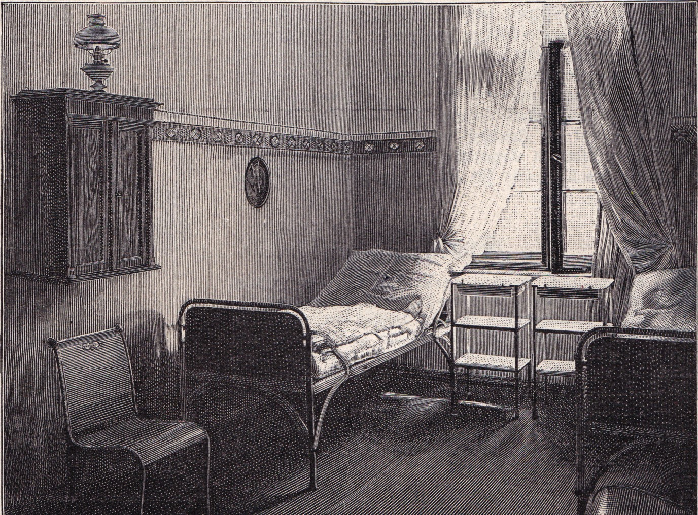 Schlafzimmer für zwei Bewohner des Lepraheims bei Memel